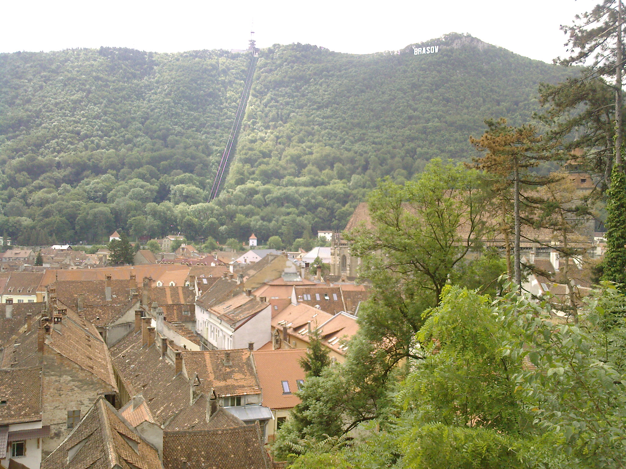 Braşov